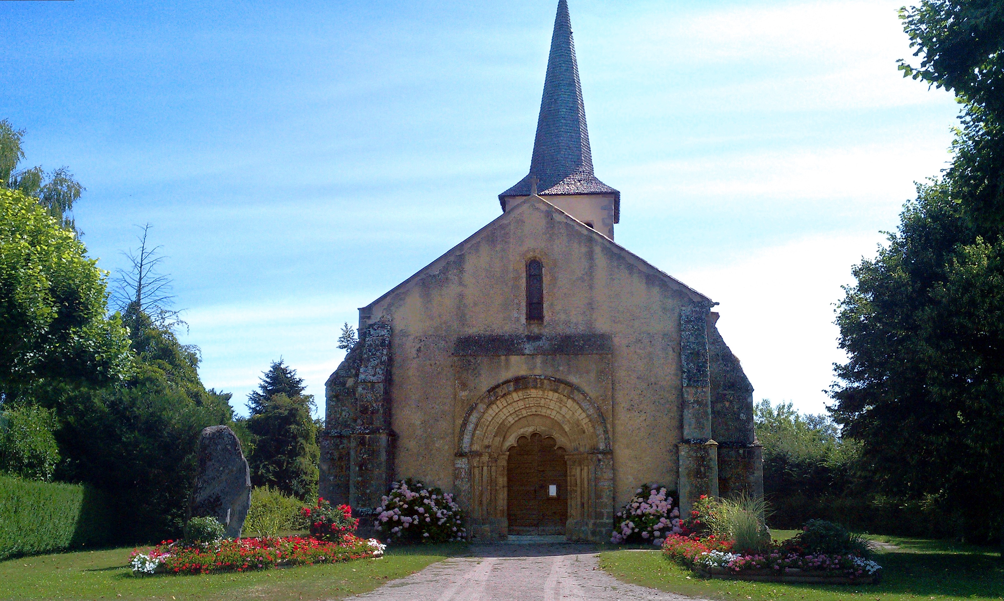 L'église de le Vilhain avec la pierre Chevriau (menhir) à gauche.